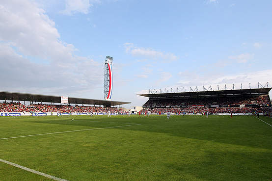 Estádio Cidade de Barcelos - 2010-11 Campeão da 2º Liga